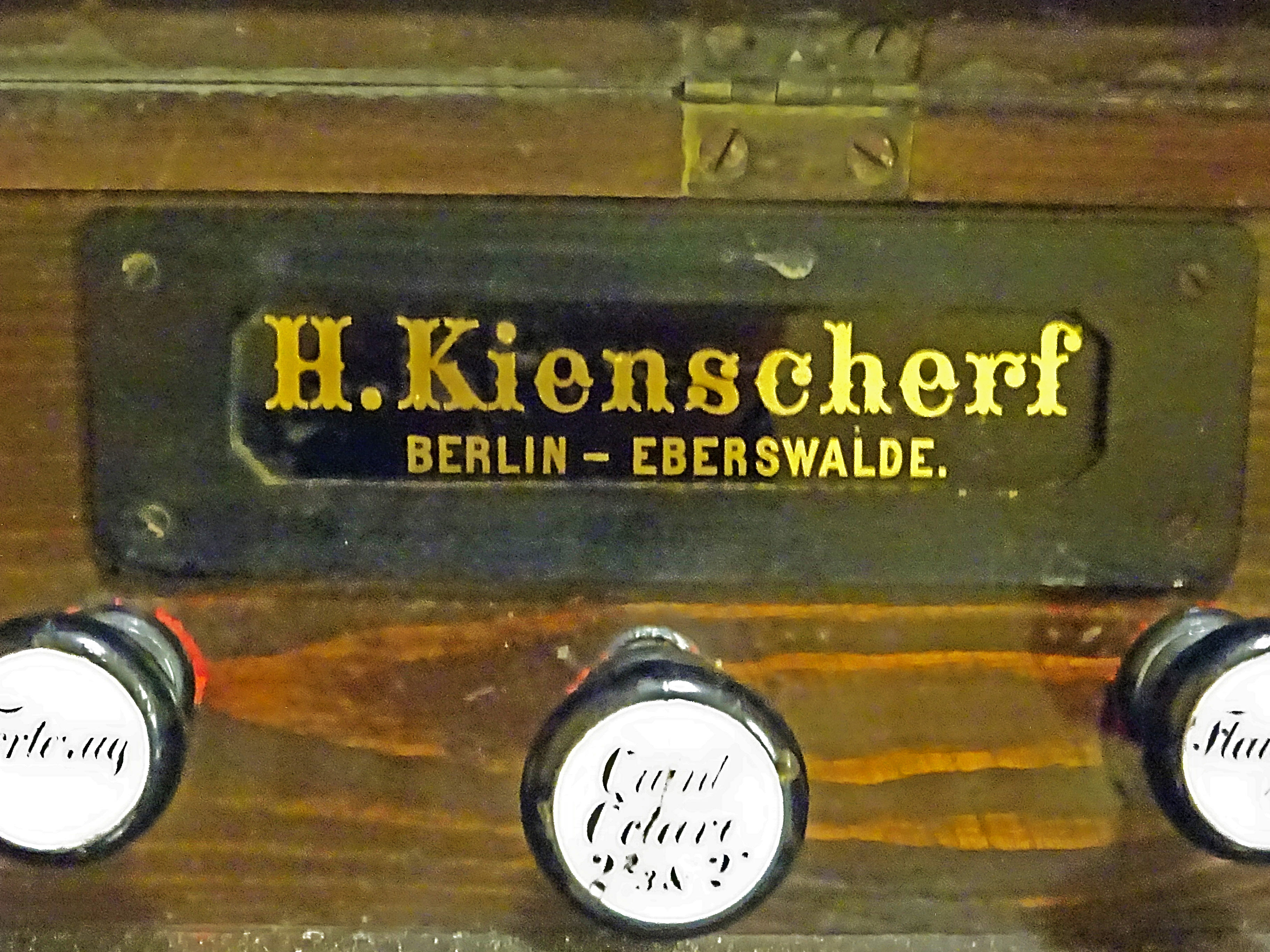 Detail am Orgel-Spieltisch von Hermann Kienscherf (1889) in der Französisch-reformierten Dorfkirche Groß Ziethen (Barnim)